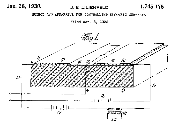 Из патента США 1745175, выданного Юлиусу Лилиенфельду: первый прототип полевого транзистора.The first historical patent for field-effect transistor